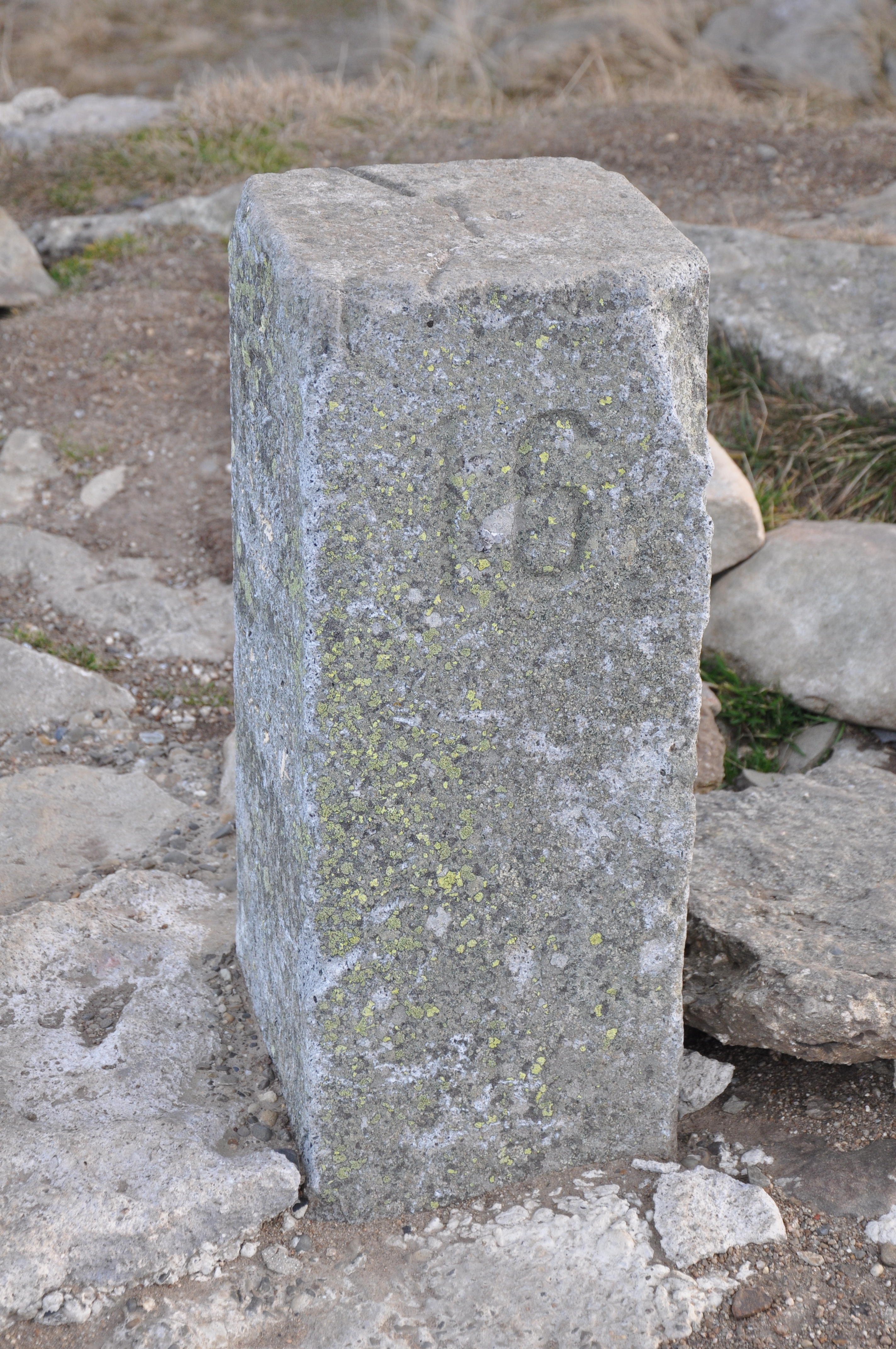 Старий прикордонний стовпчик № 16 1920-х рр.